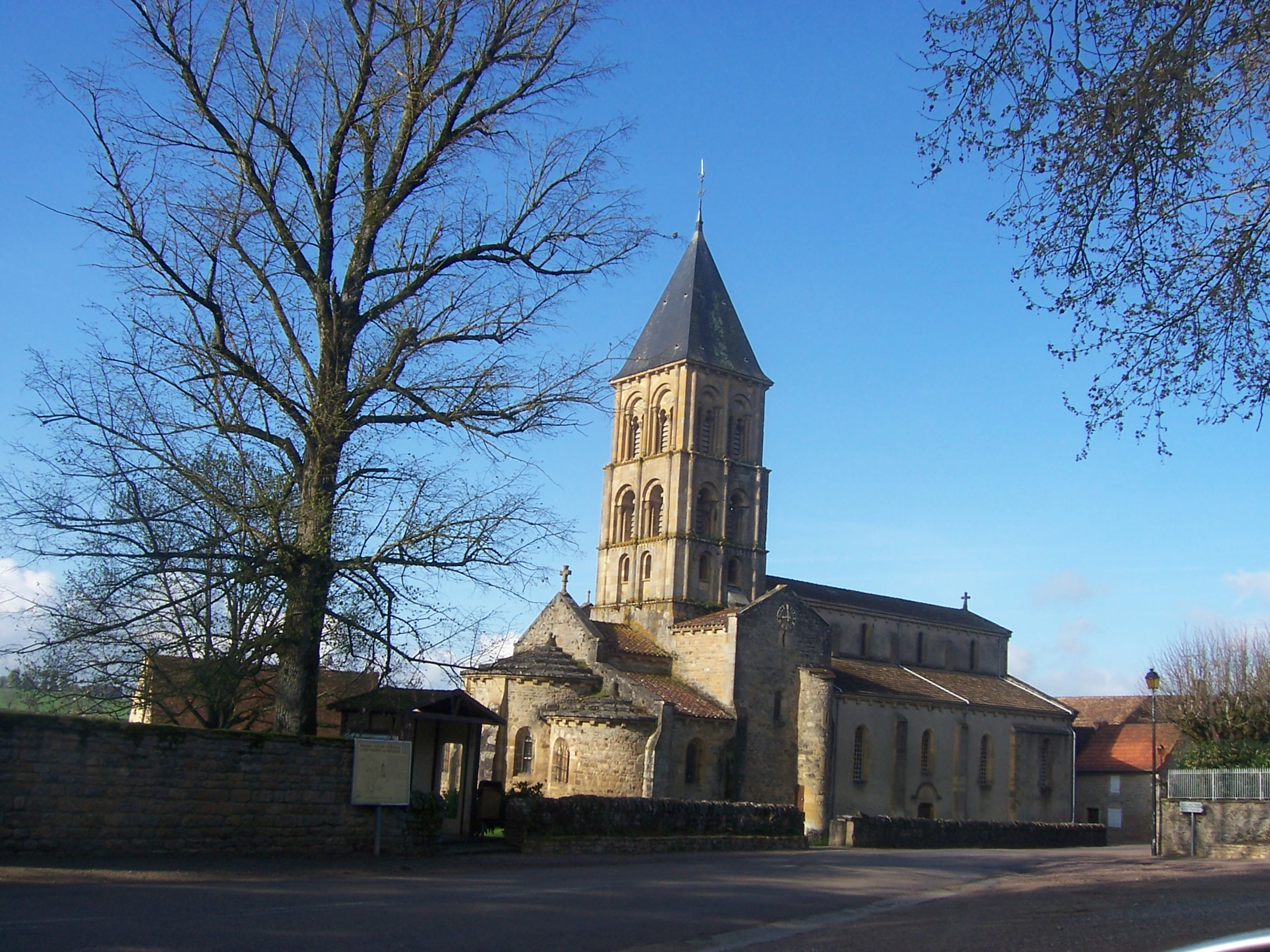 Eglise de Saint-Laurent-en-Brionnais